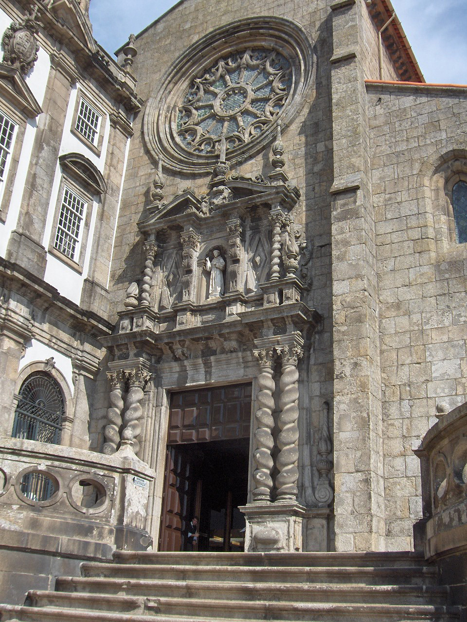 Church of Sao Francisco; Porto, Portugal